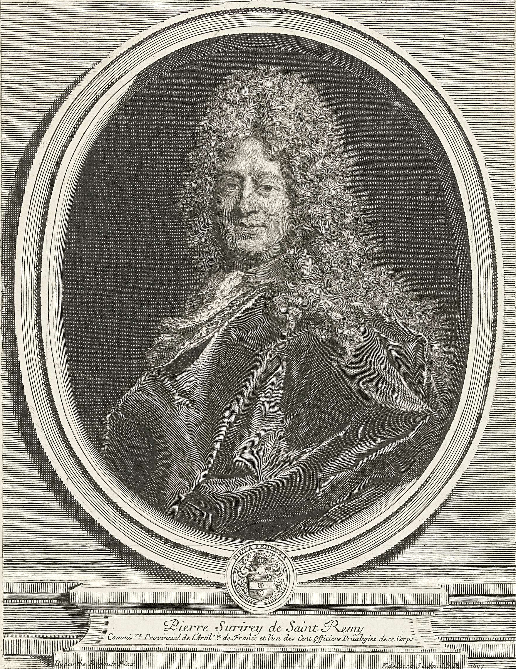 portrait de M. Surirey de Saint Remy par Hyacinthe Rigaud, gravure de Edelinckdans l'exemplaire de la troisième édition de la B.M. de Reims.